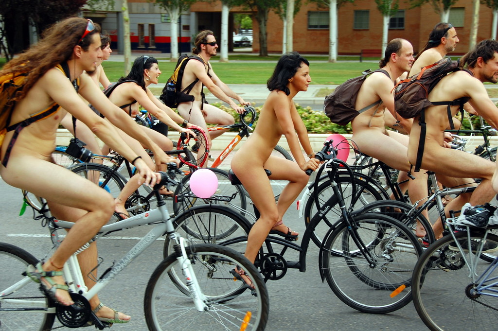 WNBR Zaragoza